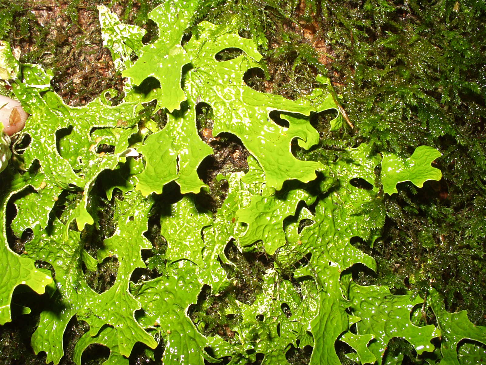 Echte Lungenflechte (Lobaria pulmonaria) auf Acer pseudoplatanus, Karstgebiet nahe Kočevje, Slowenien